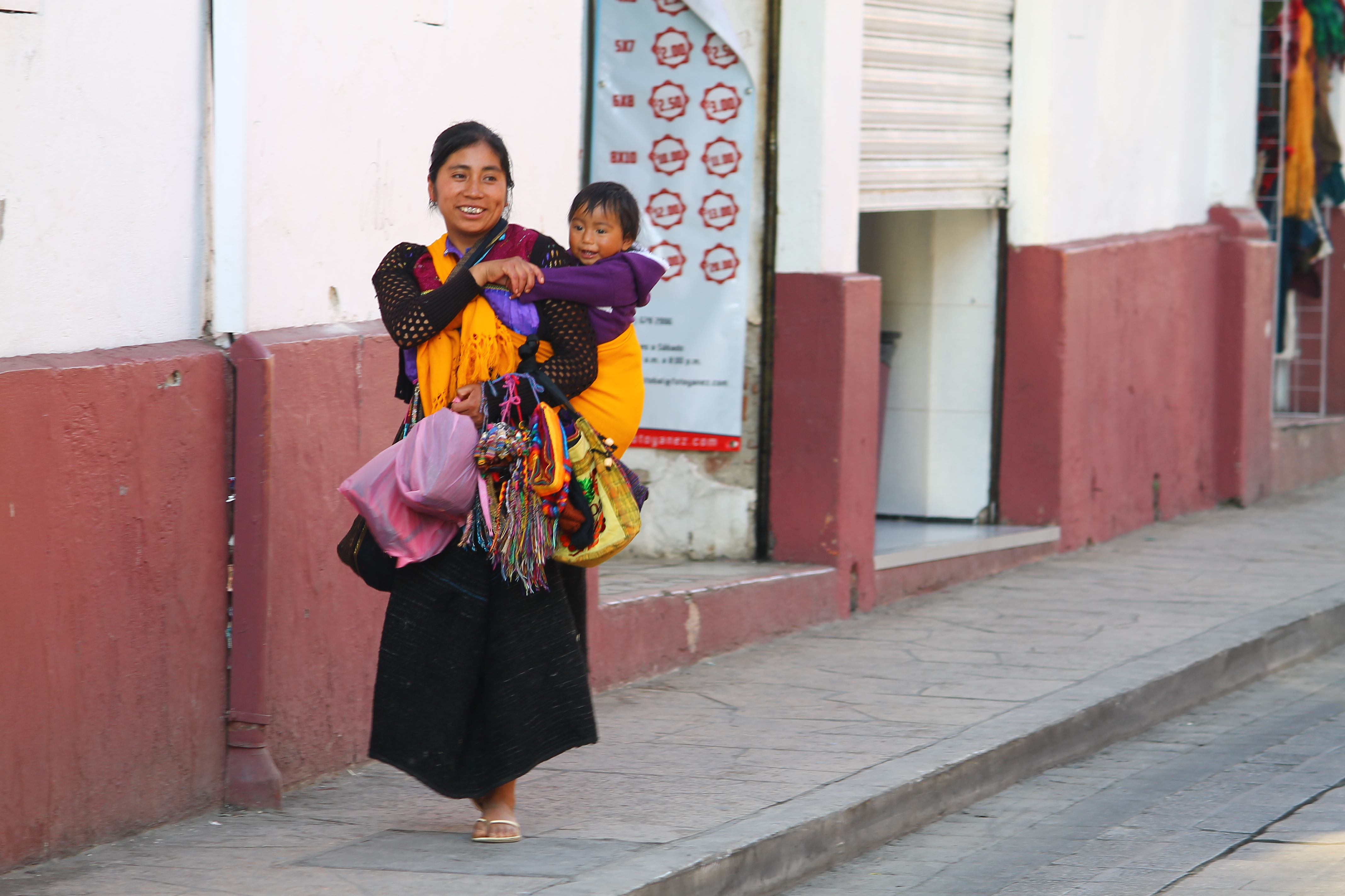 Folklore de la vida cotidiana de San Cristobal de las Casas, Chiapas.